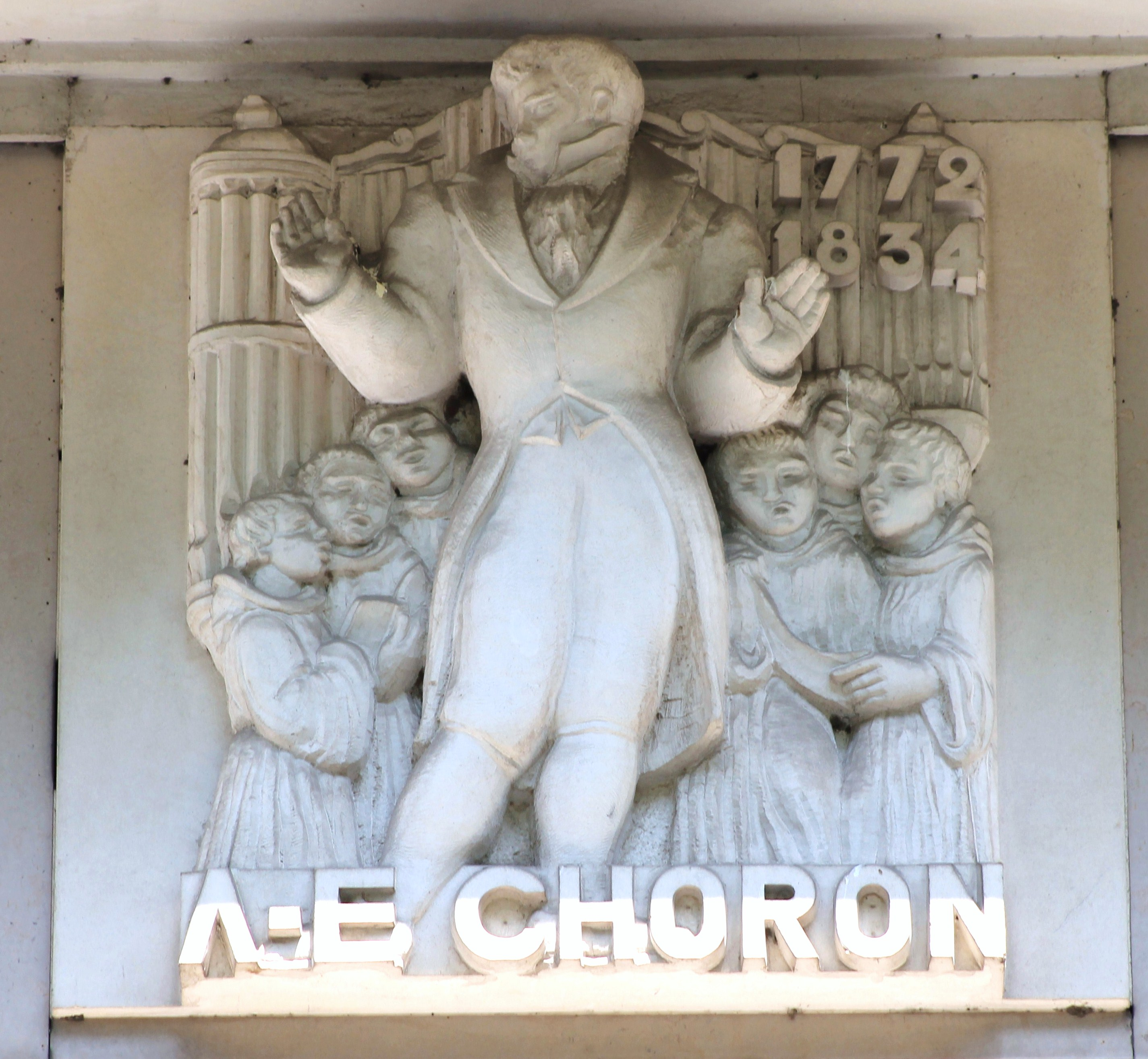 Bas-relief sur la façade de l'hôtel Malherbe à Caen (Calvados). Alexandre-Étienne Choron